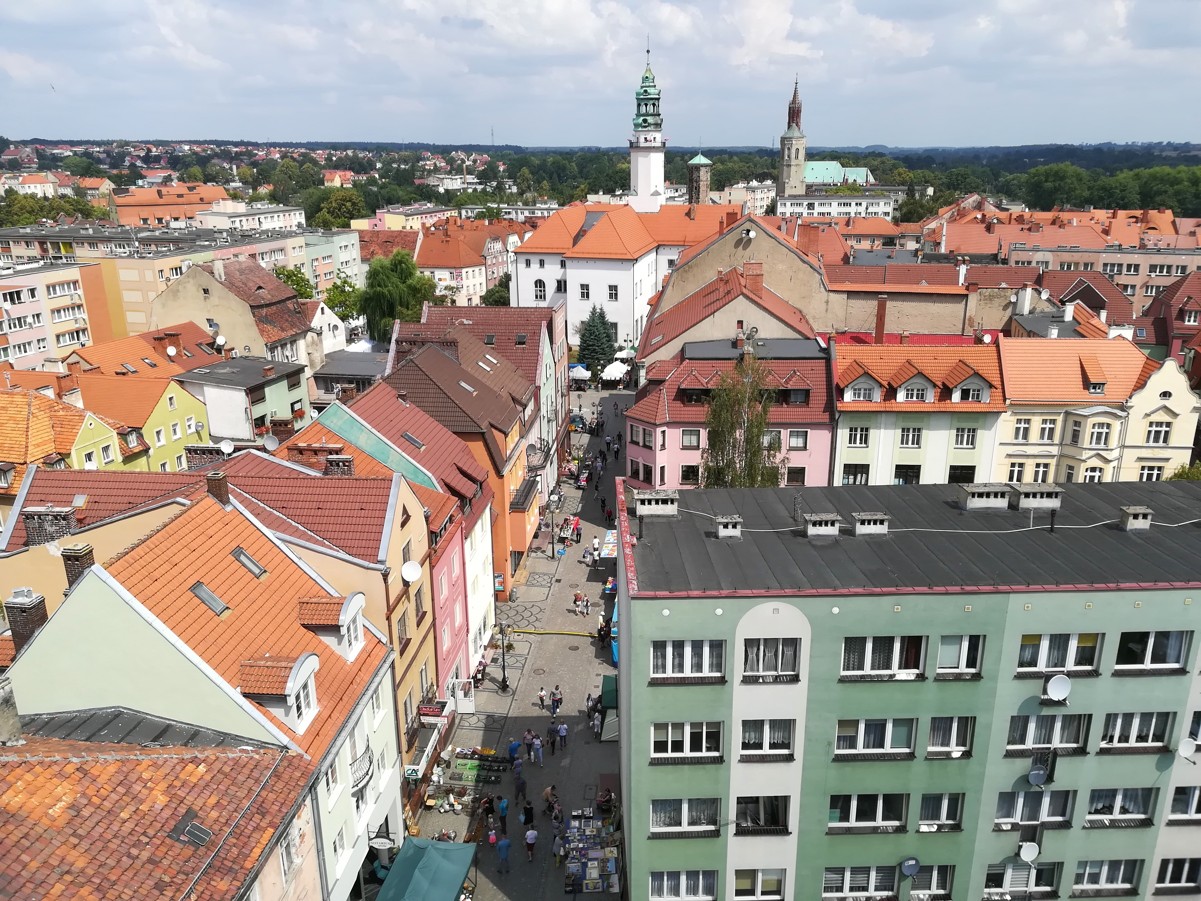 Widok z Wieży Brackiej w Lubaniu Śl.